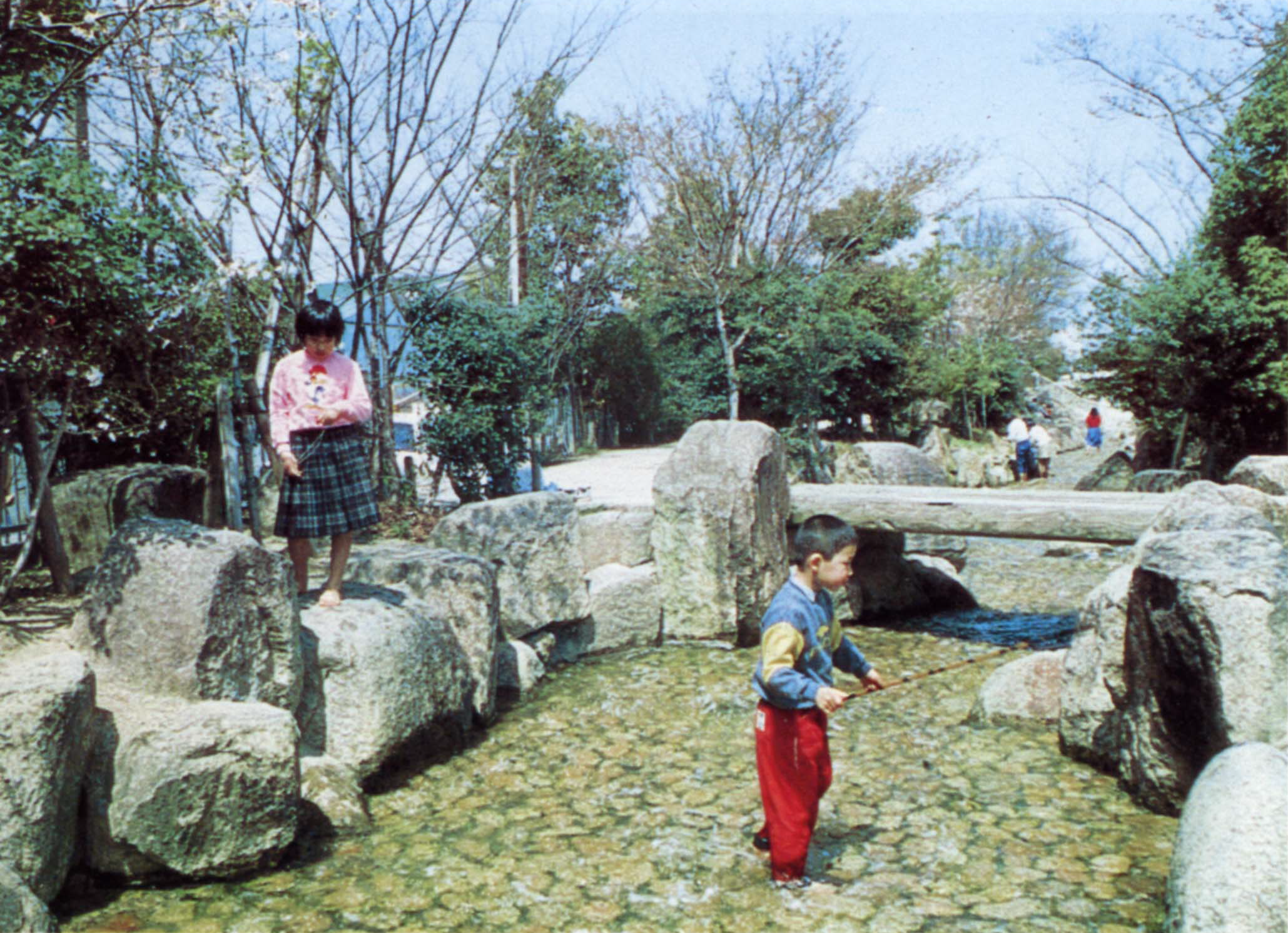 今川（大阪市東住吉区湯里と平野区喜連西の境界）